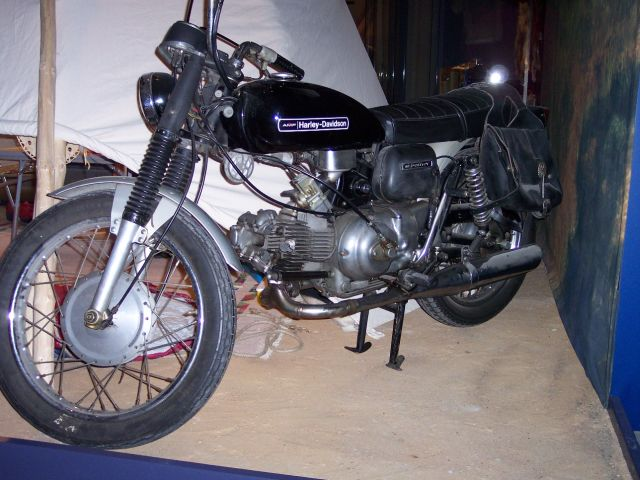 Harley Davidson, eigentlich eine Aermacchi, 1-Zylinder Motorrad